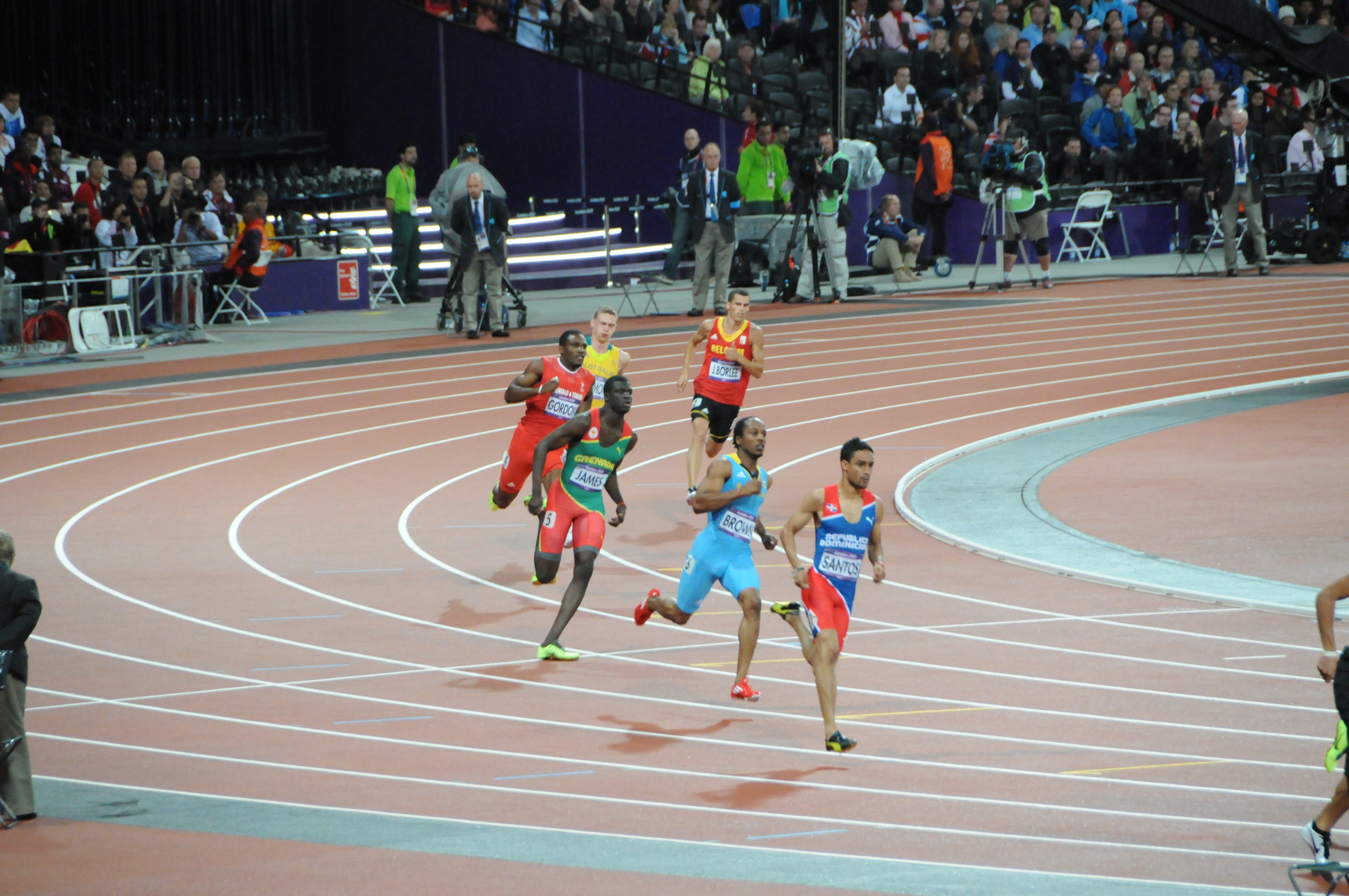 Finale du 400m hommes des jeux olympiques de Londres, 2012